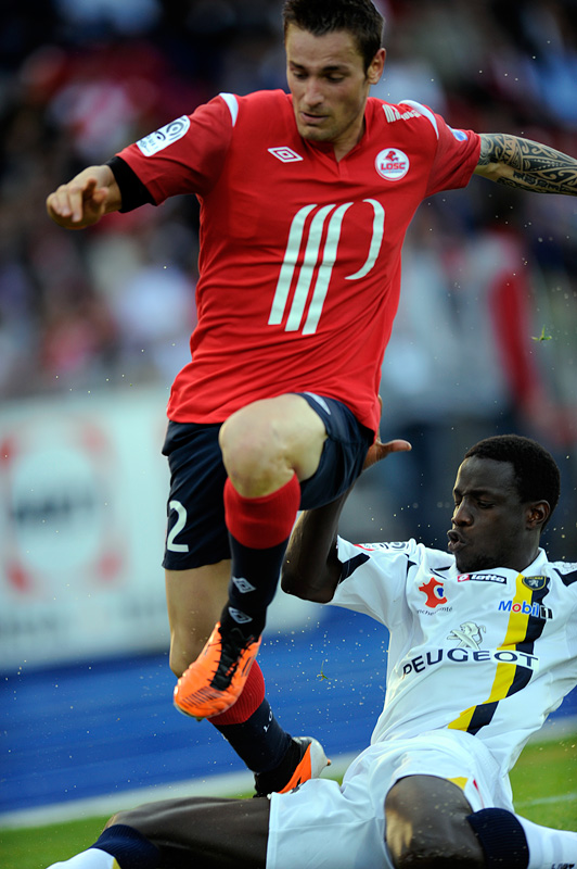 Lille v Sochaux Mathieu Debuchy Follow me at